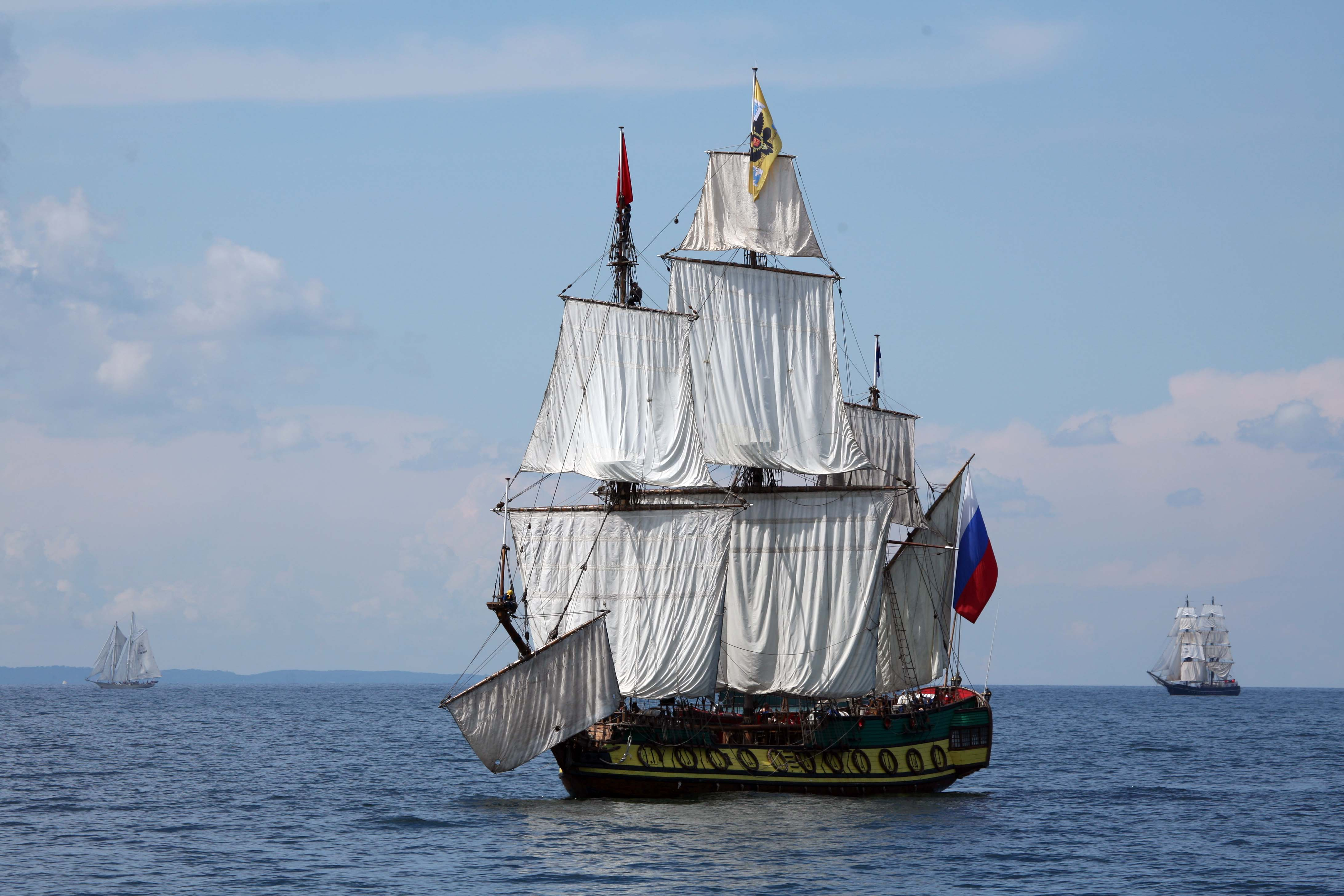 La frégate russe Shtandart